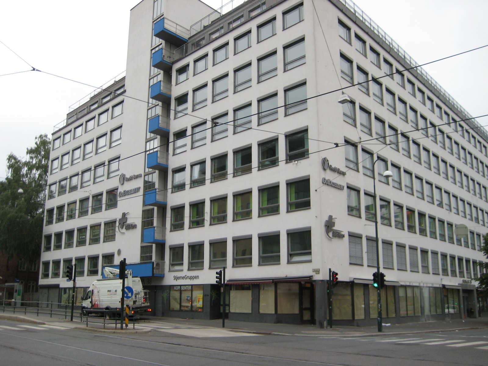 GoExcellents kontor i Oslo